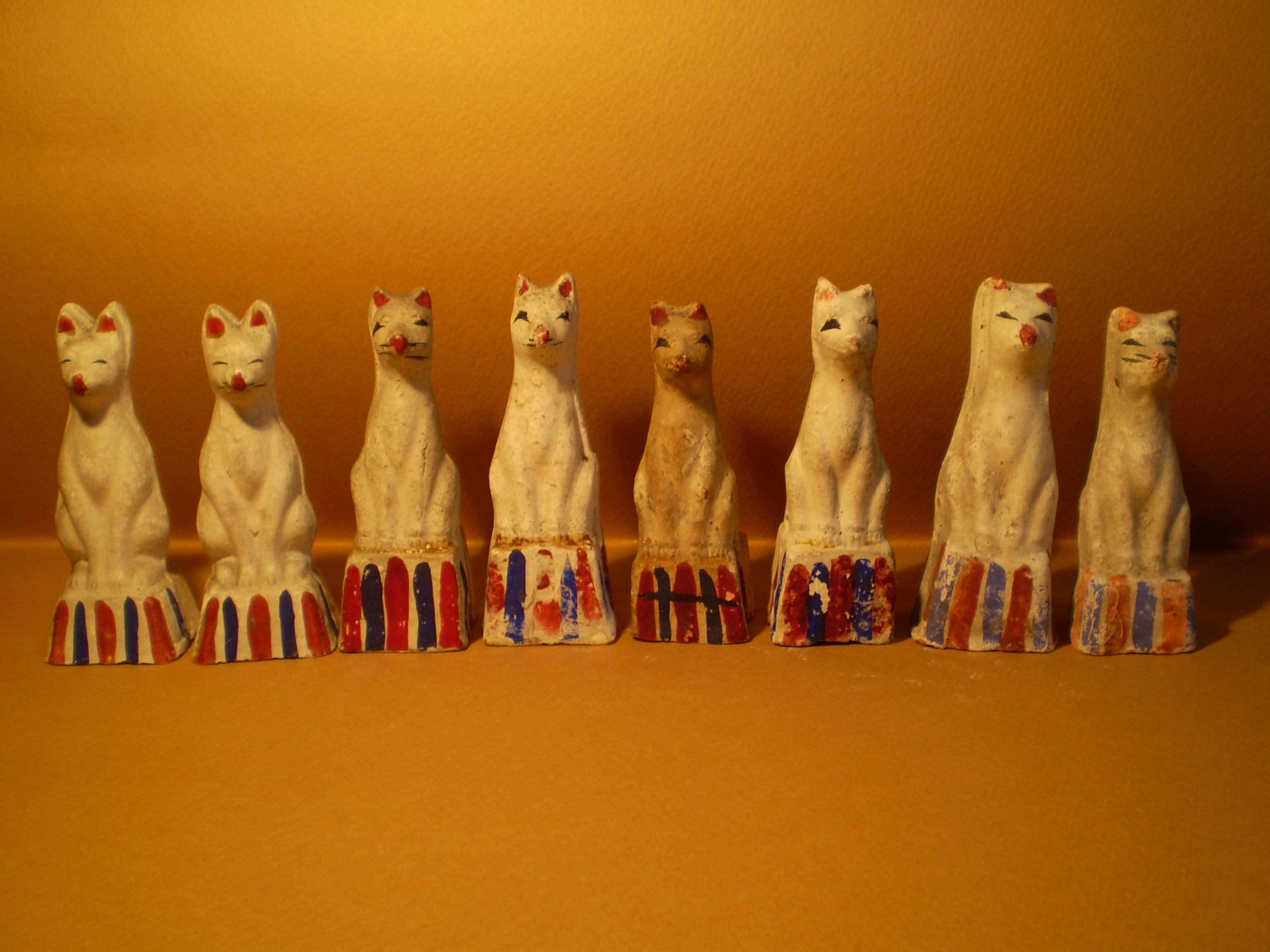 今戸人形「鉄砲狐」（明治～昭和戦前）今戸焼 稲荷奉納用の狐